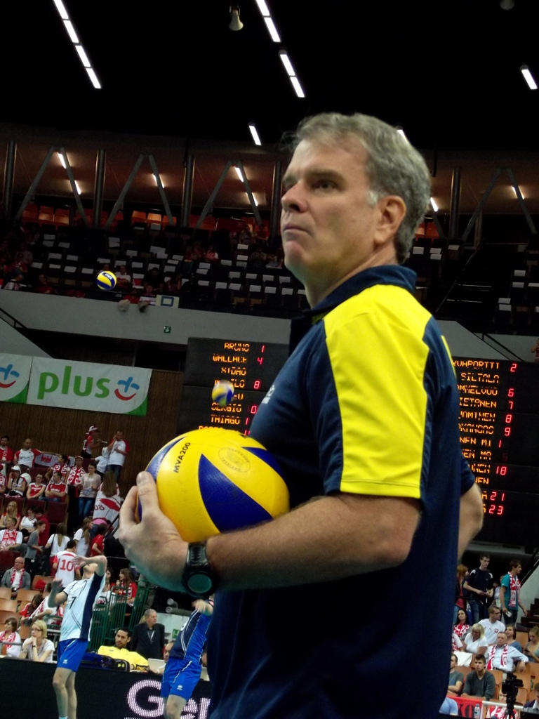 Zdjęcie zrobione podczas zawodów Ligi Światowej 2012 w katowickim Spodku.